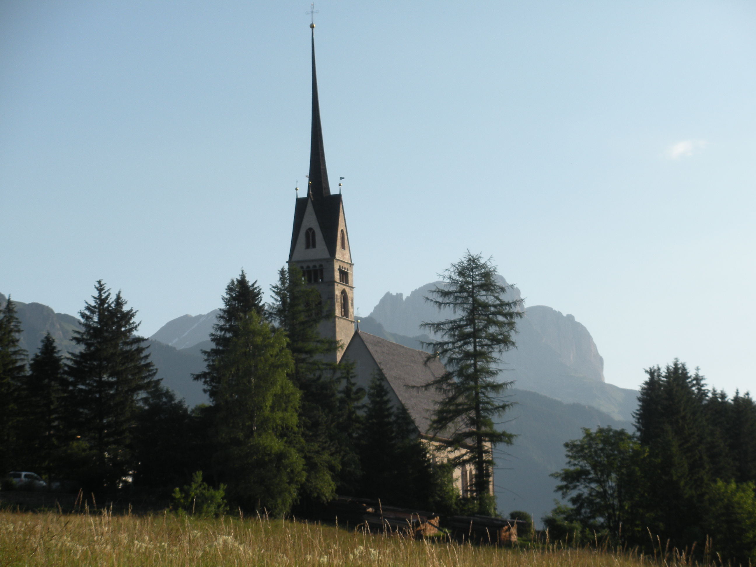 Vigo di Fassa (TN), Chiesa di San Giovanni Foto propria Luglio 2009